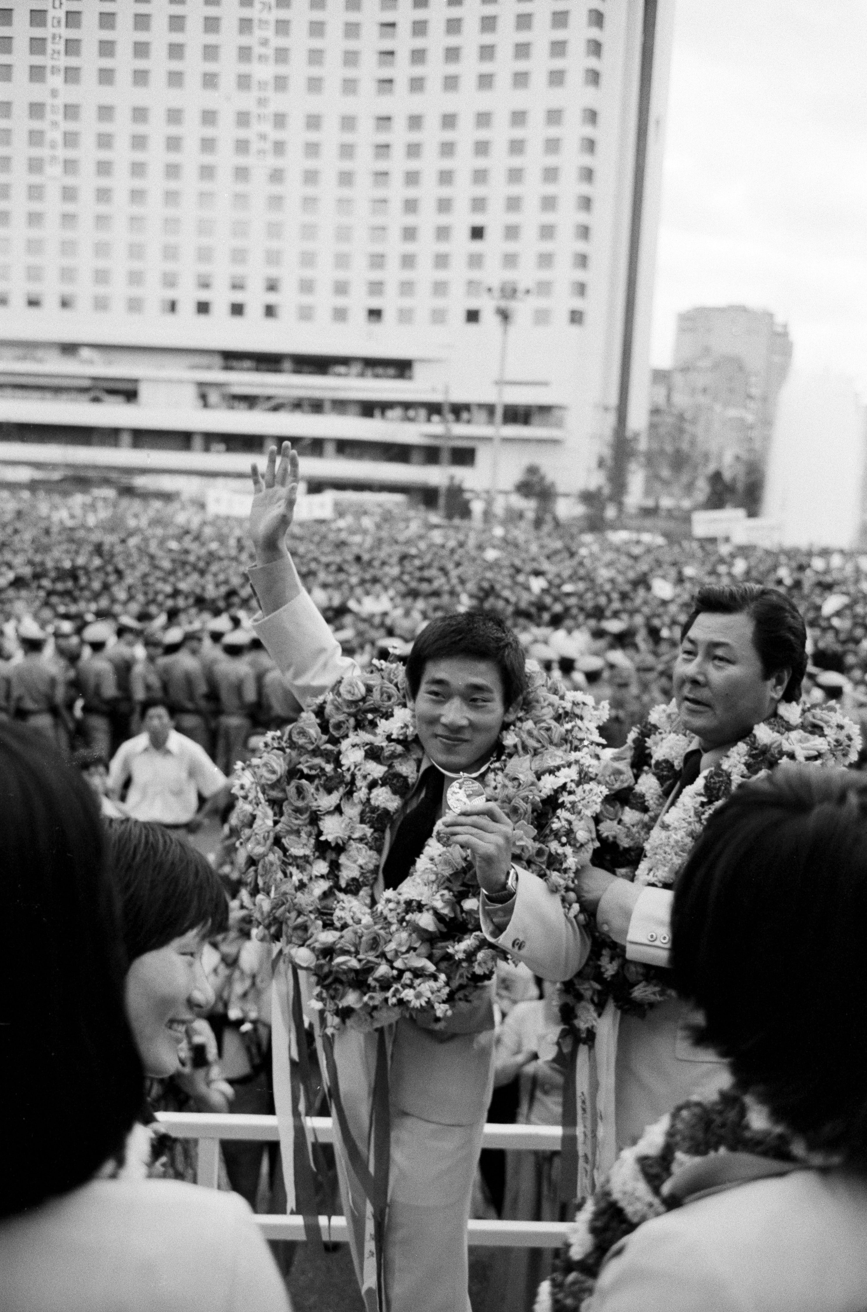 제21회 몬트리올올림픽 한국 선수단 개선 환영대회와 레슬링 금메달리스트 양정모 선수 촬영일 : 1976년 08월 03일 촬영장소 : 대한민국 서울 참석자 : 양정모 선수 인물상세정보 : 양정모 선수(중앙) , 미상(전체) 관련내용 : 제21회 몬트리올올림픽 한국 선수단 개선 환영대회와 레슬링 금메달리스트 양정모 선수